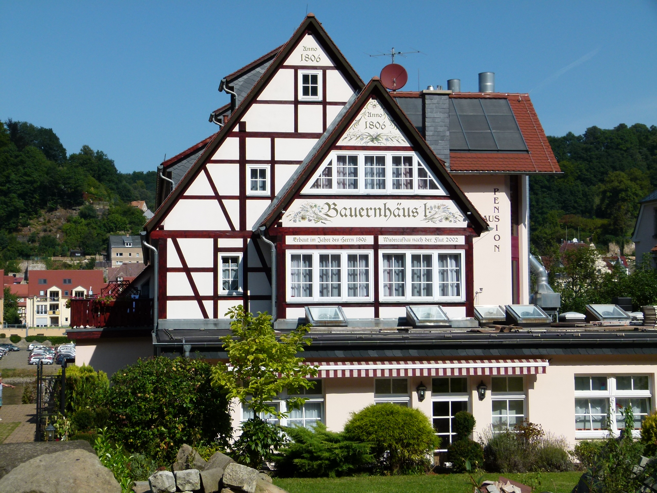 Denkmalgeschütztes Haus, Bahnhofstraße 4, Ortsteil Pötzscha, Stadt Wehlen, Sachsen